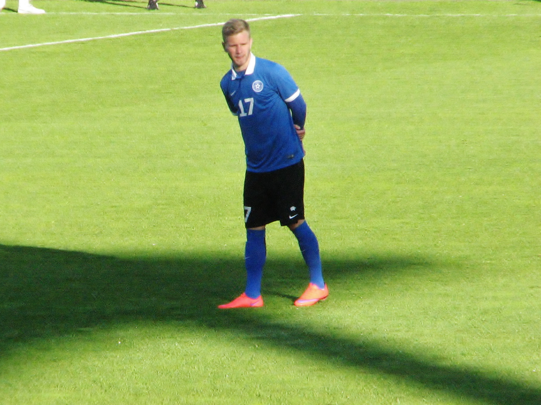 Markus Jürgenson mängimas Eesti jalgpallikoondises Soome vastu Veritase staadionil